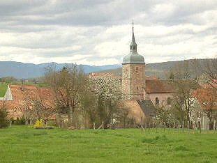 village de Buc (Territoire de Belfort) avec église et herbe verte printanière Photo prise le 19 avril 2004 par LP90 Licence GFDL LP90 avril 2004